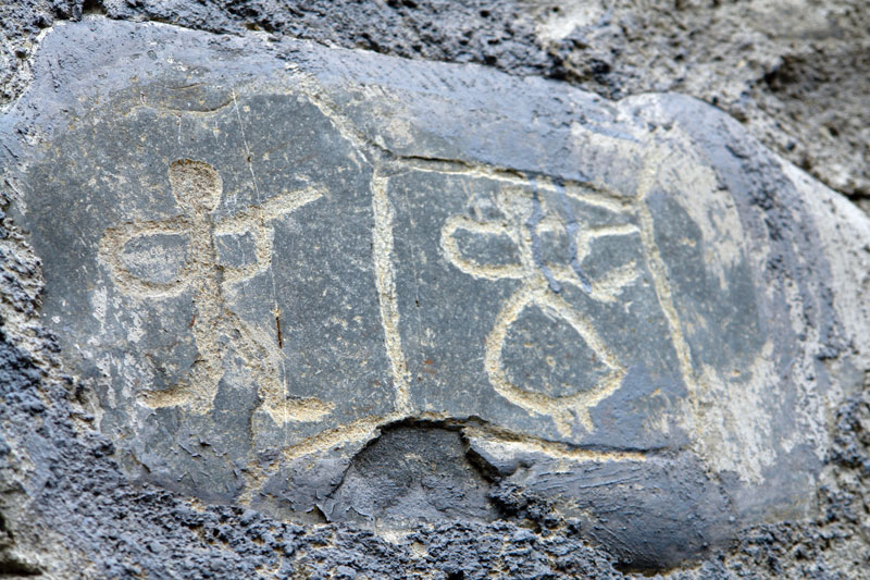 Ardoti in Khevsureti Georgia